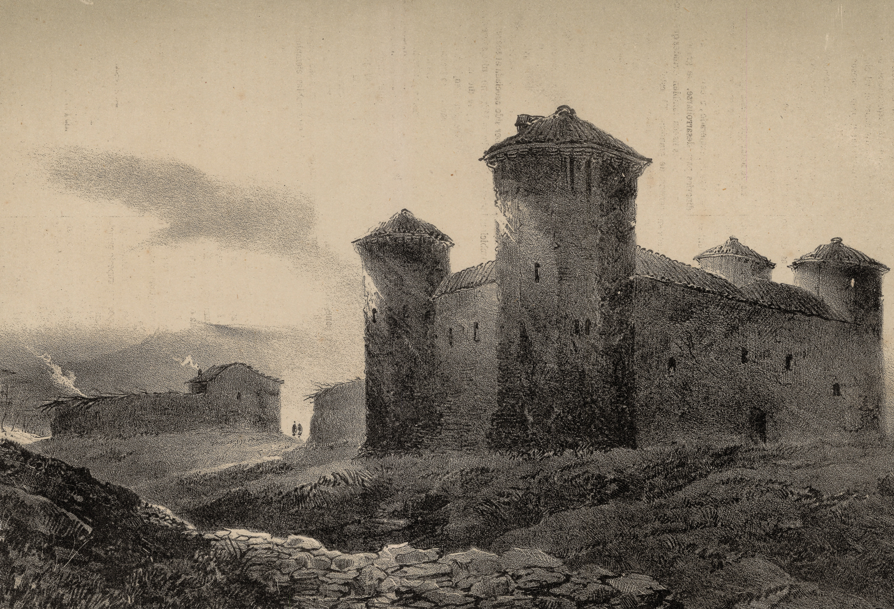 Aragon. Castillo de D. Antonio de Leiva, en la Rioja / Pedro Pérez de Castro dib. y lit..